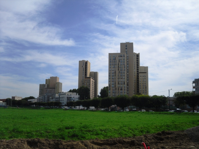 Le quartier de la Croix-Blanche à Vigneux-sur-Seine (91)